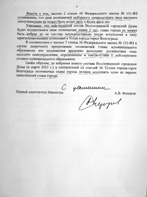 Письмо Минюста России от 04.05.2011 № 07/27954. Страница 2.